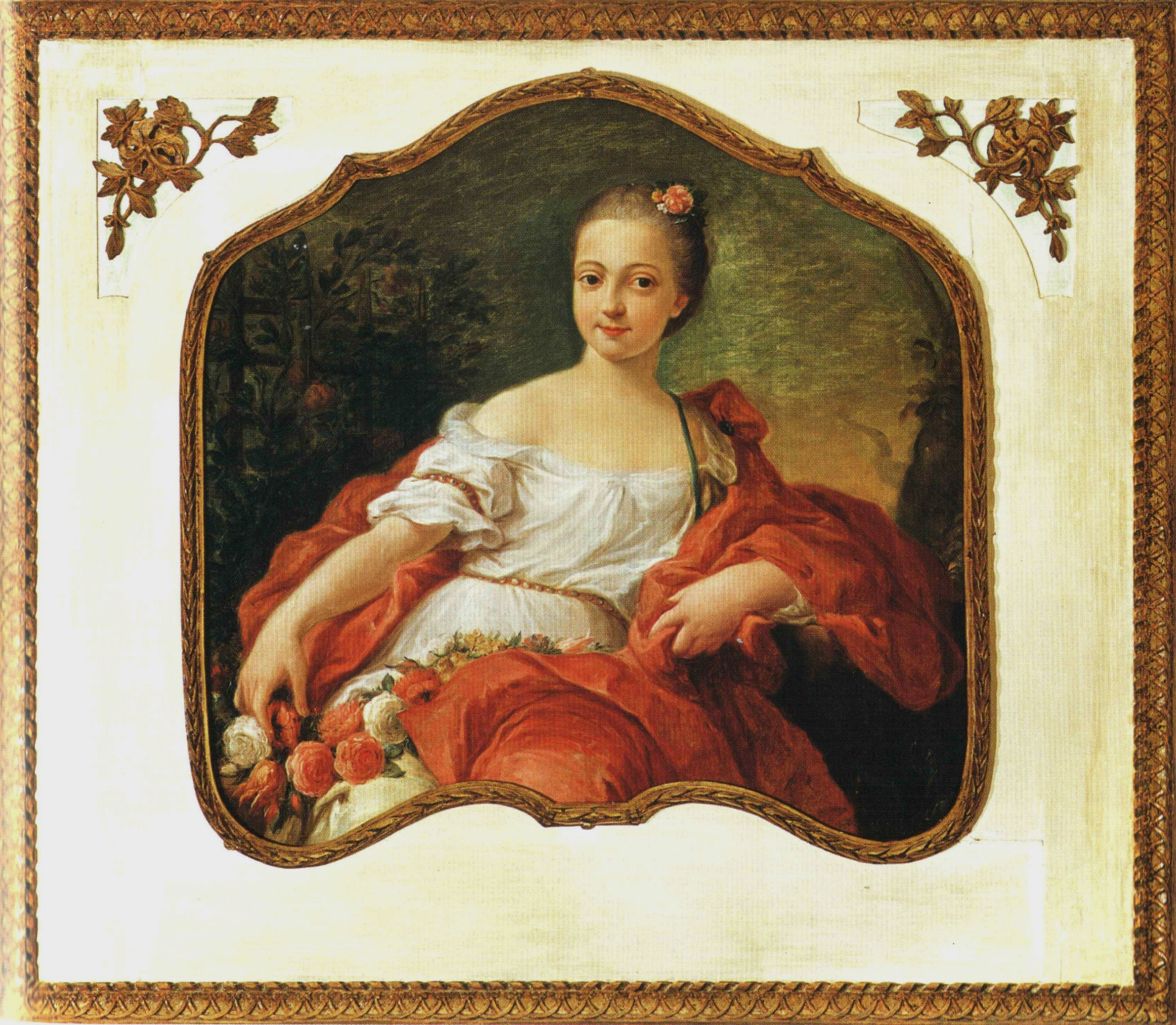 Ritratto di fanciulla, dipinto di Domenico Passerini nella saletta della musica di Palazzo Sanvitale a Parma.